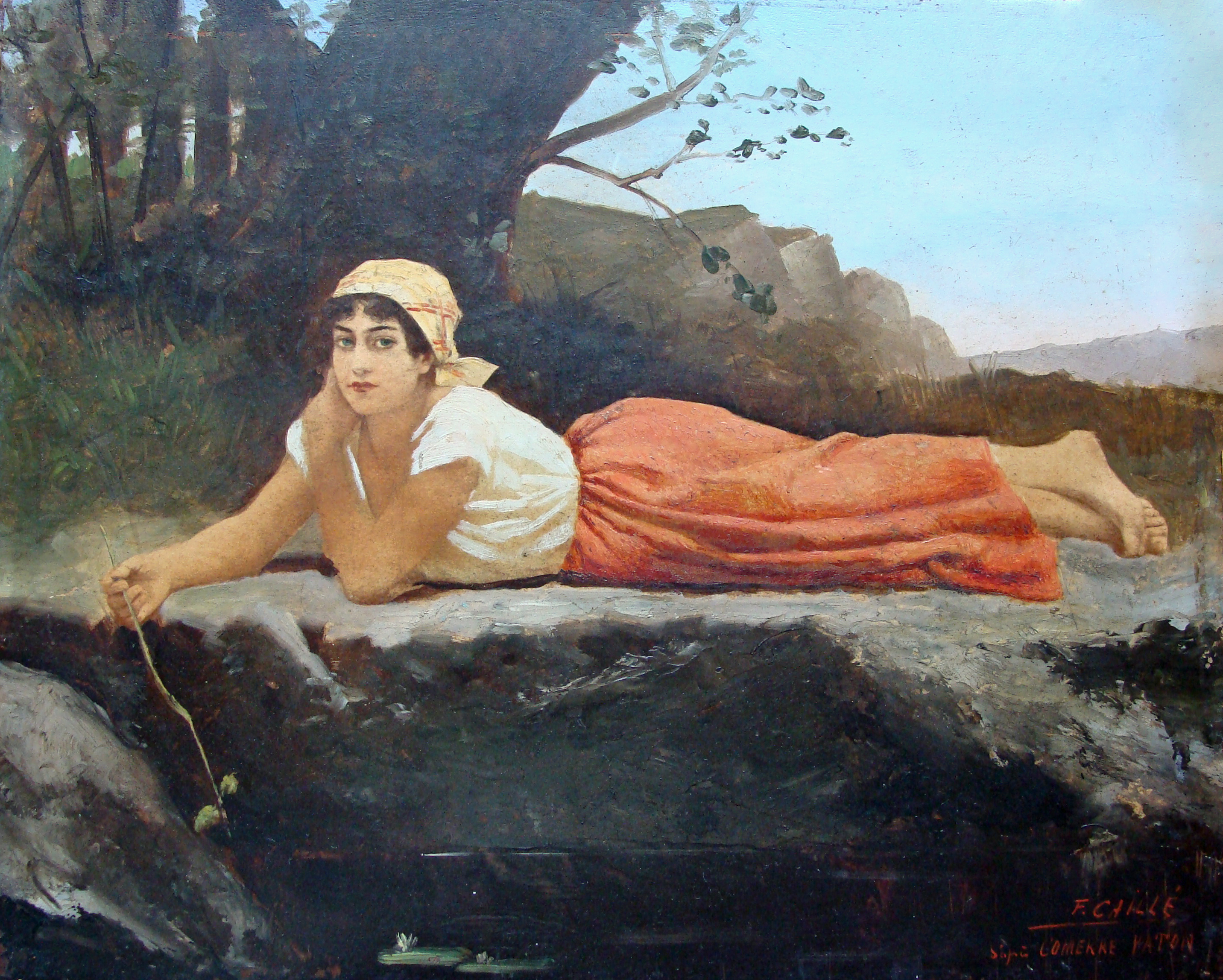 Tableau de Fanny Caillé intitulé "at the spring"